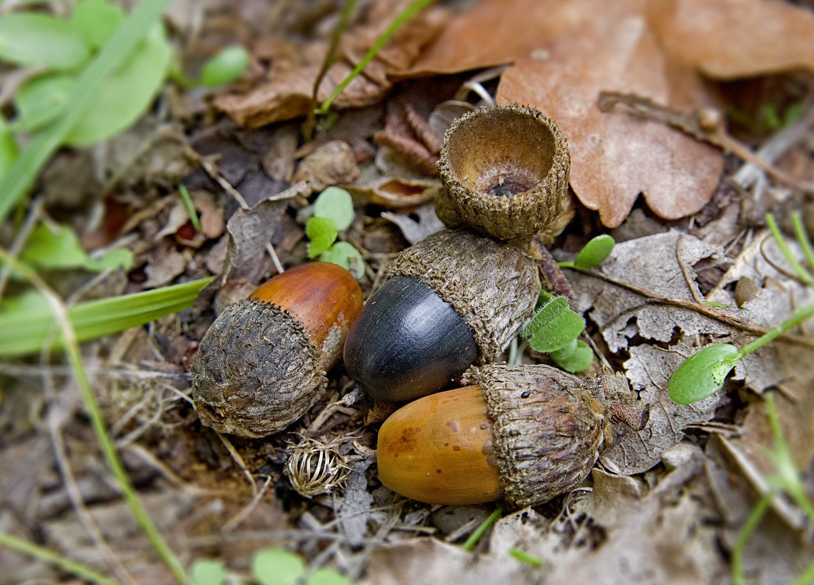 Благун - жълъди.